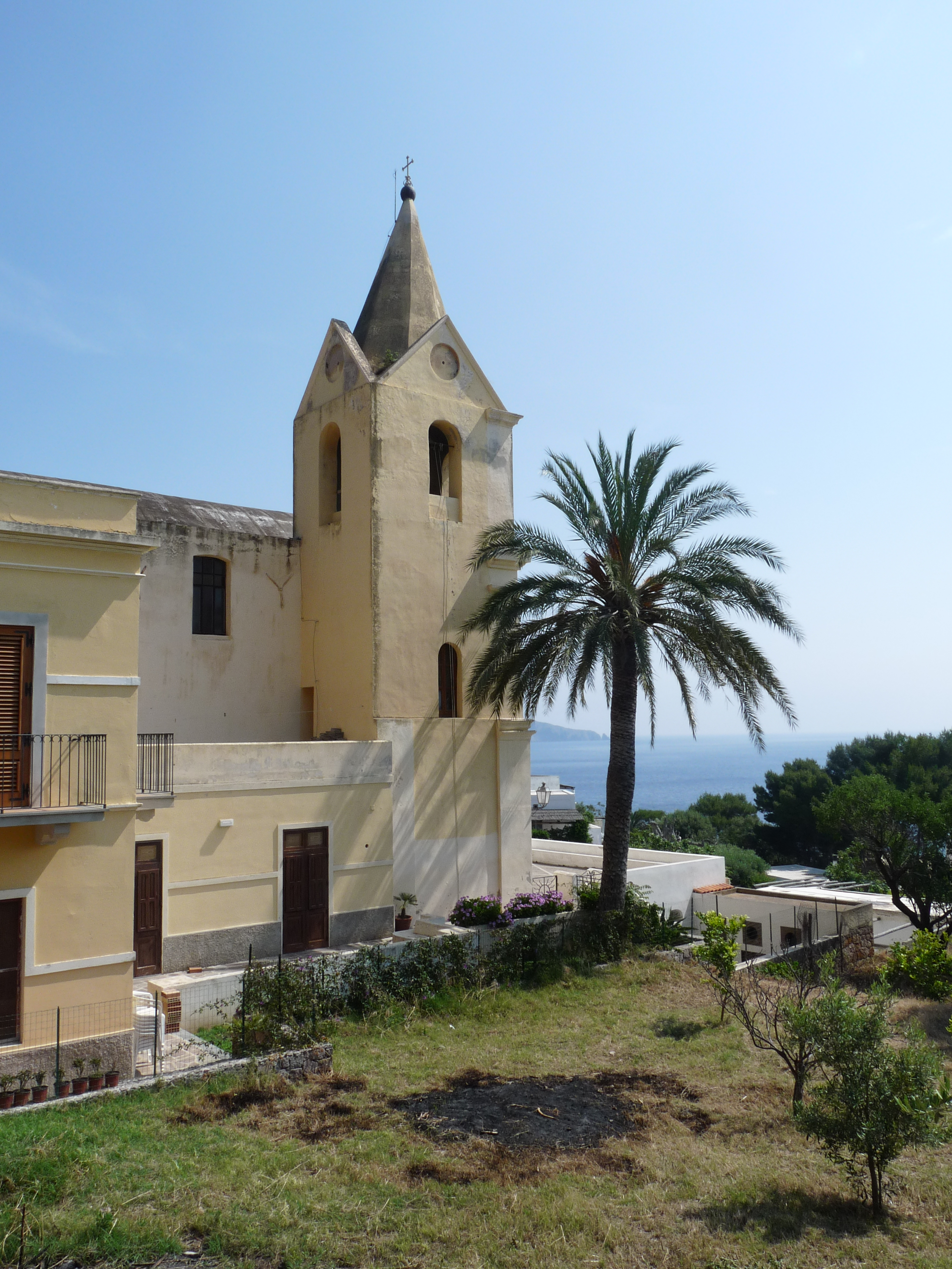 Eglise de San Pietro à Panarea (îles Eoliennes, Sicile)